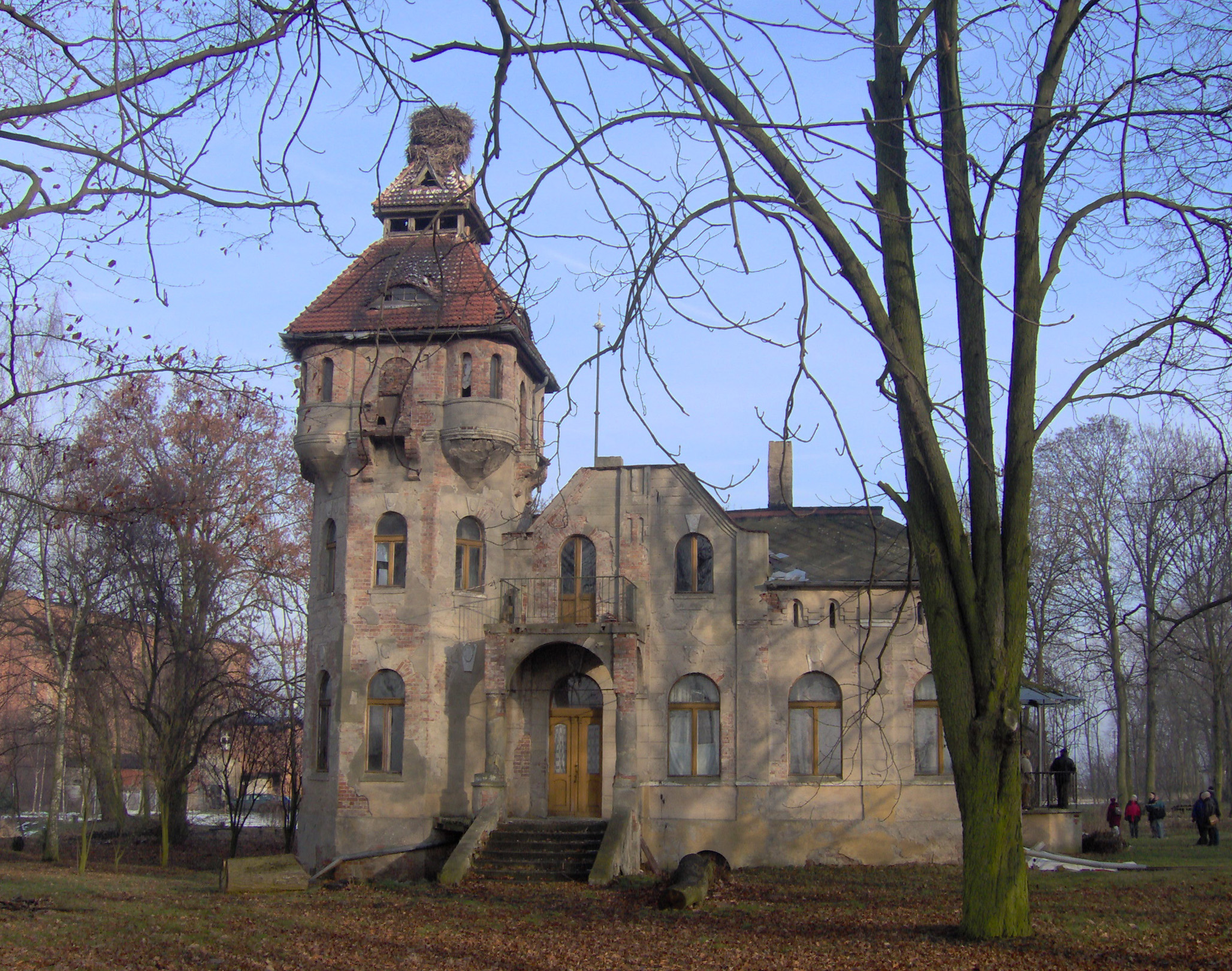 Palace from 1908 in Kijewo Szlacheckie